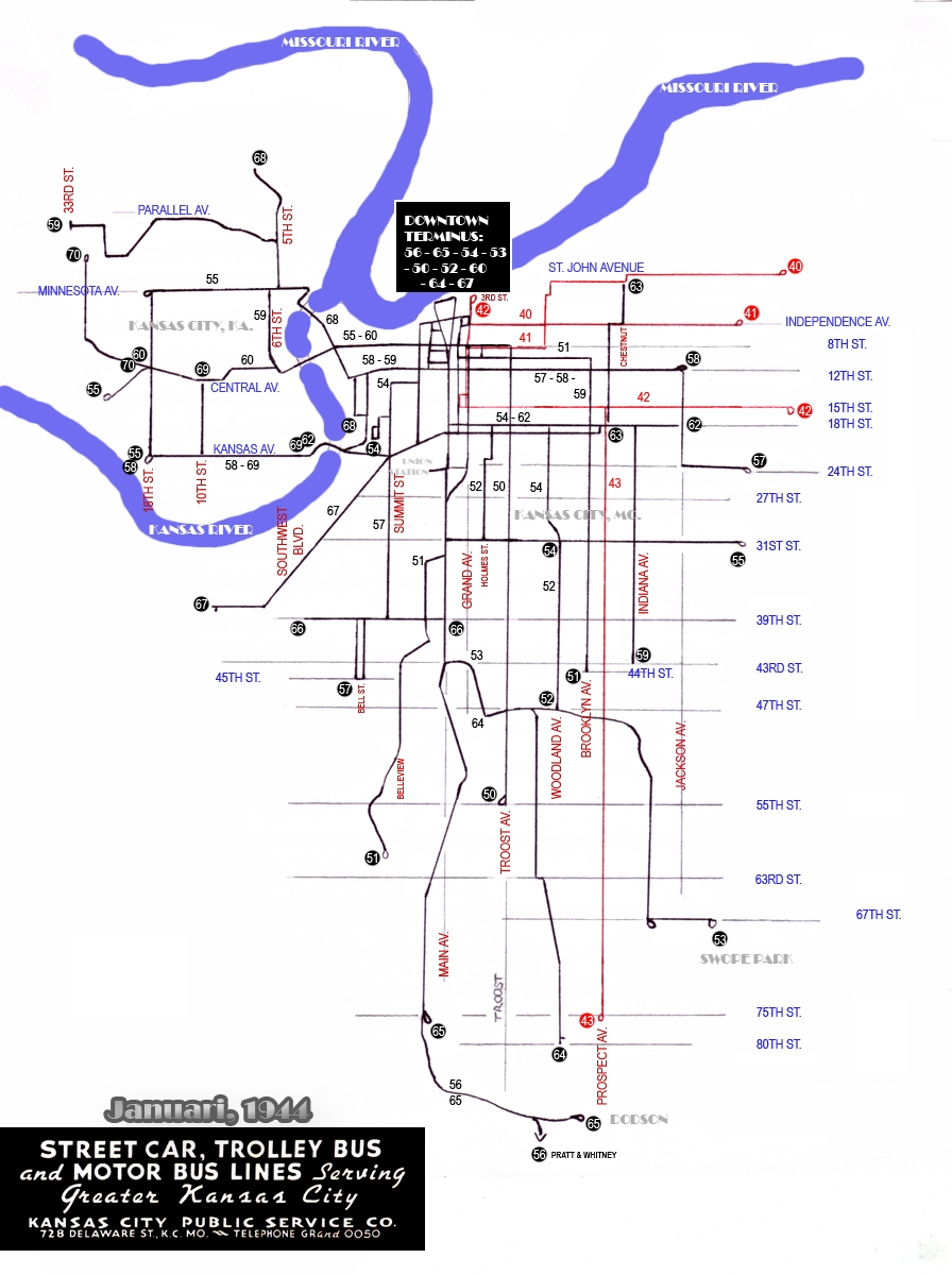 Zelfgetekende media, bewerkt in Photoshop CS